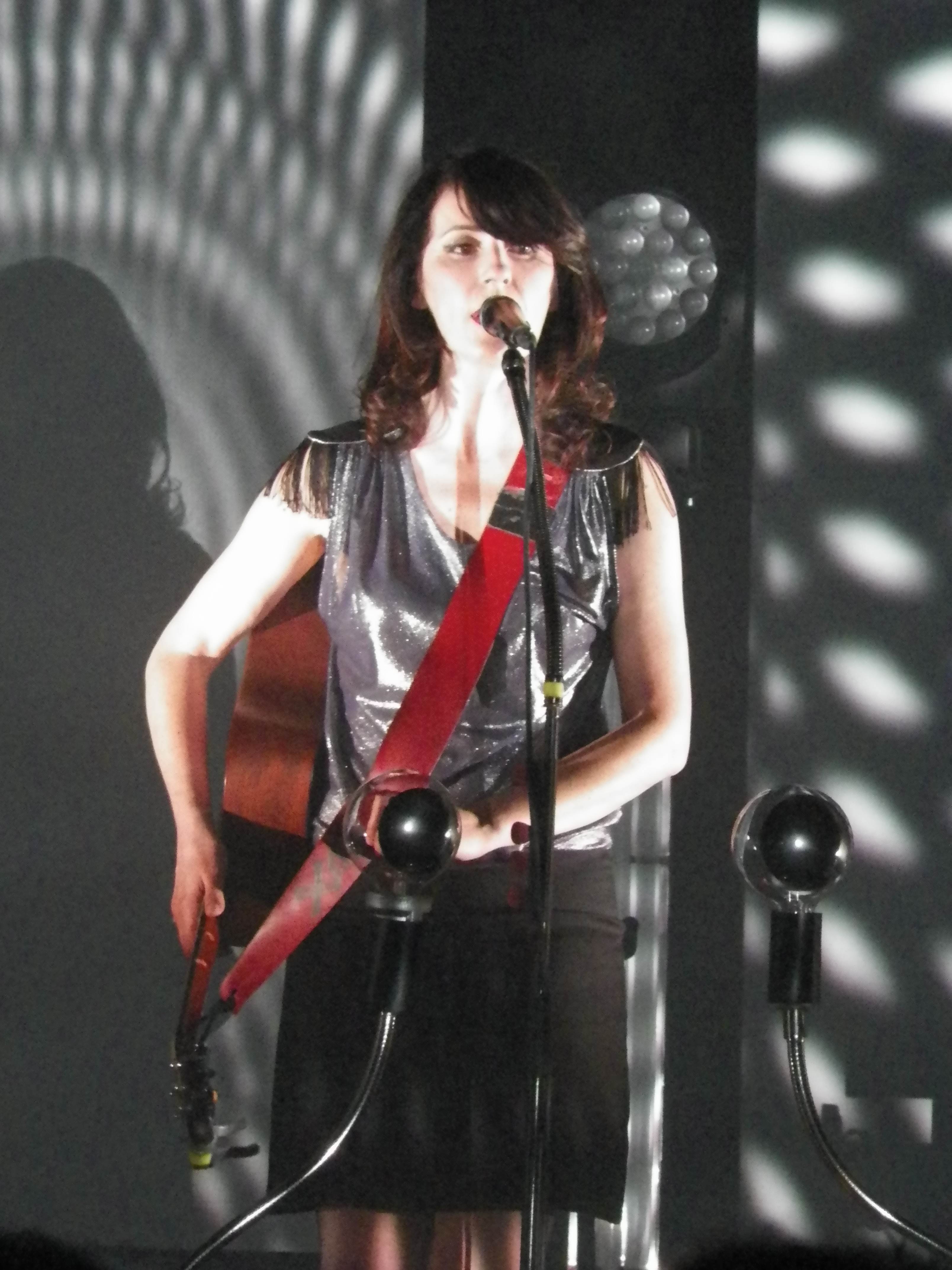 La Grande Sophie lors d'un concert en juin 2012.